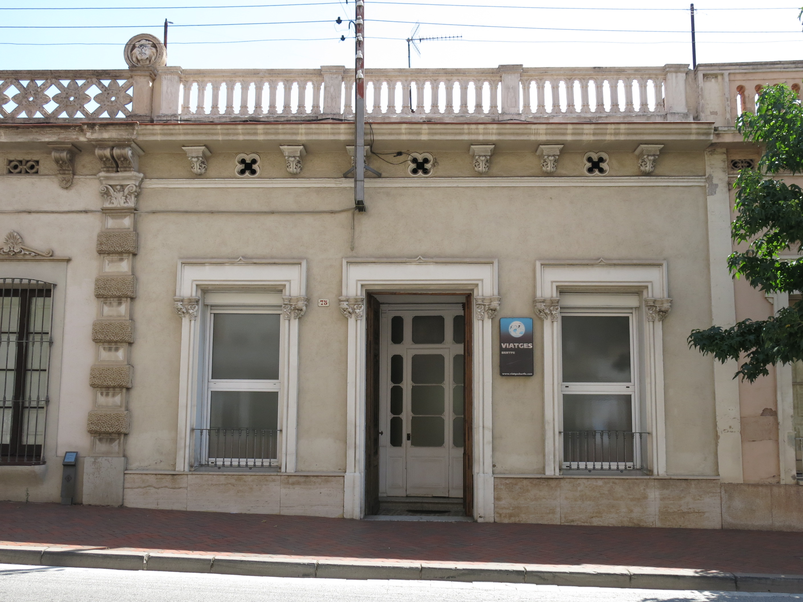 Habitatge al passeig Anselm Clavé, 75 (Sentmenat)